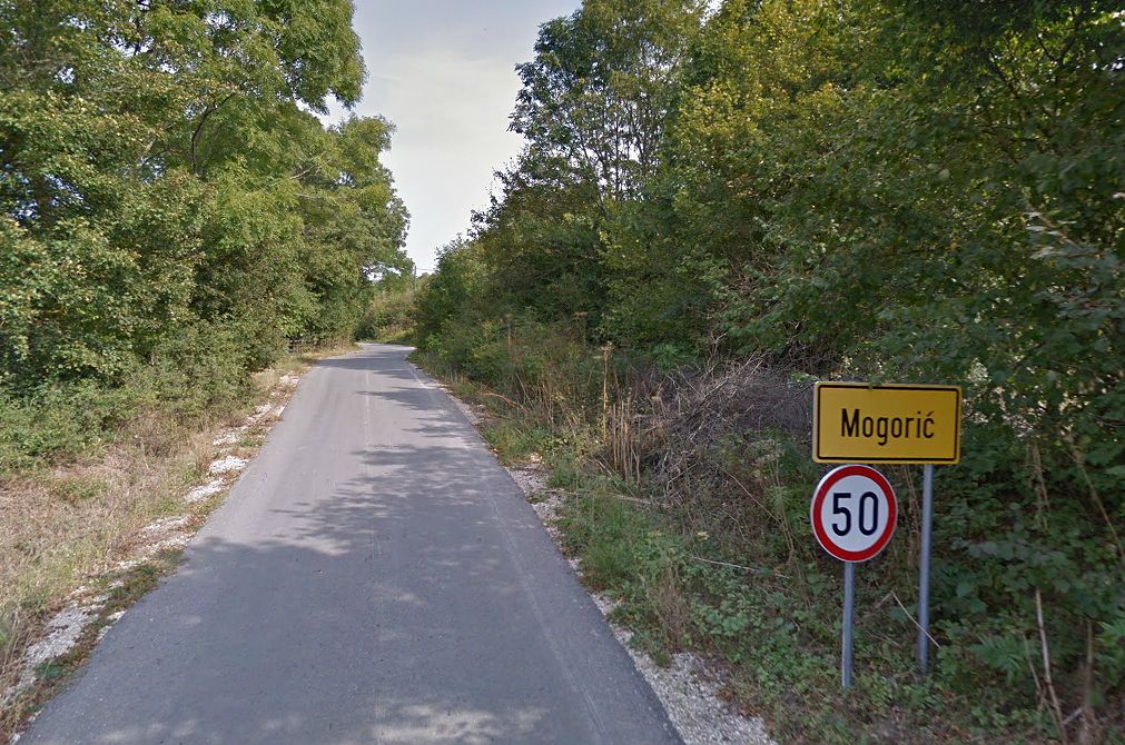 Улаз у Могорић из правца Врепца, Лика.